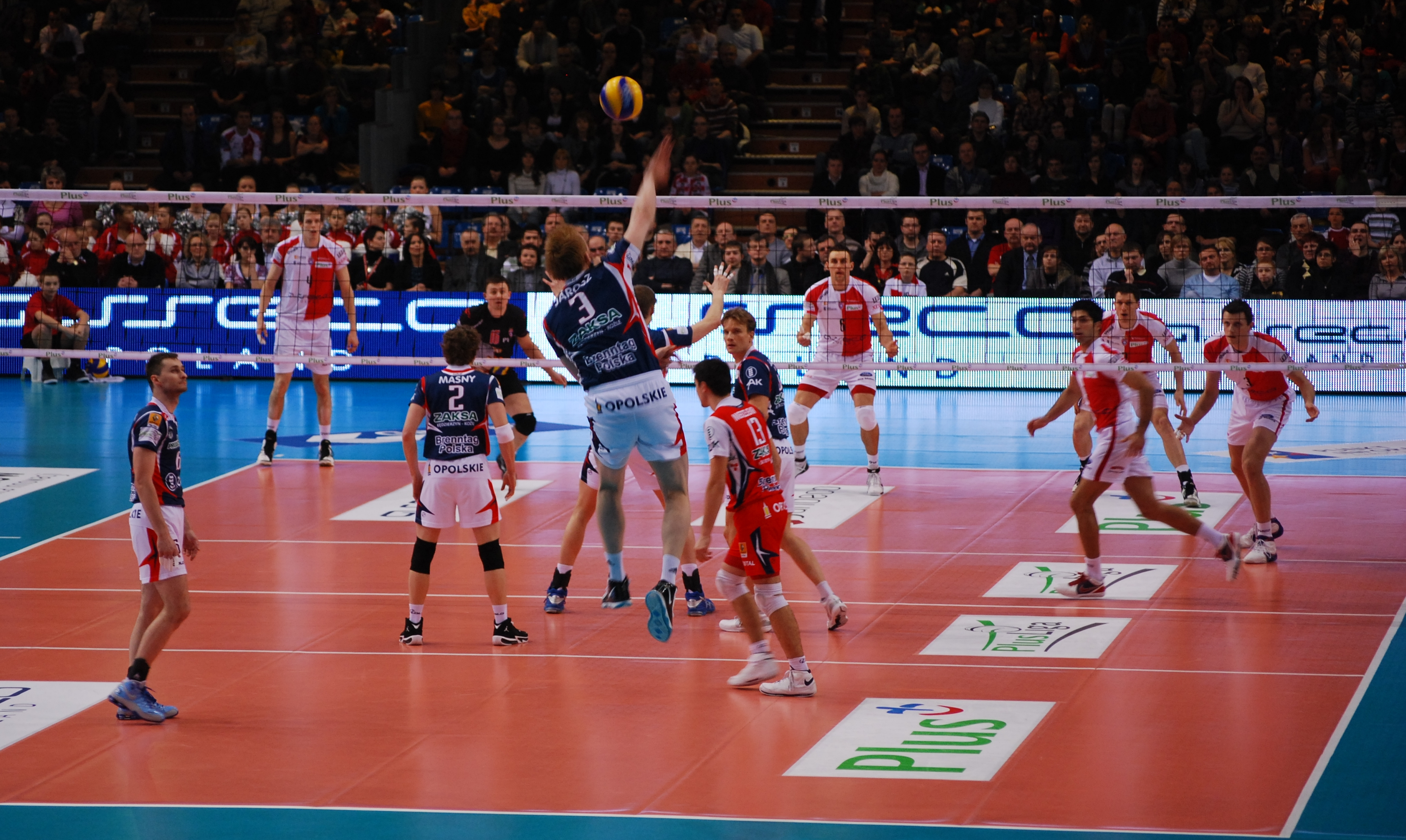 Jakub Jarosz na zagrywce